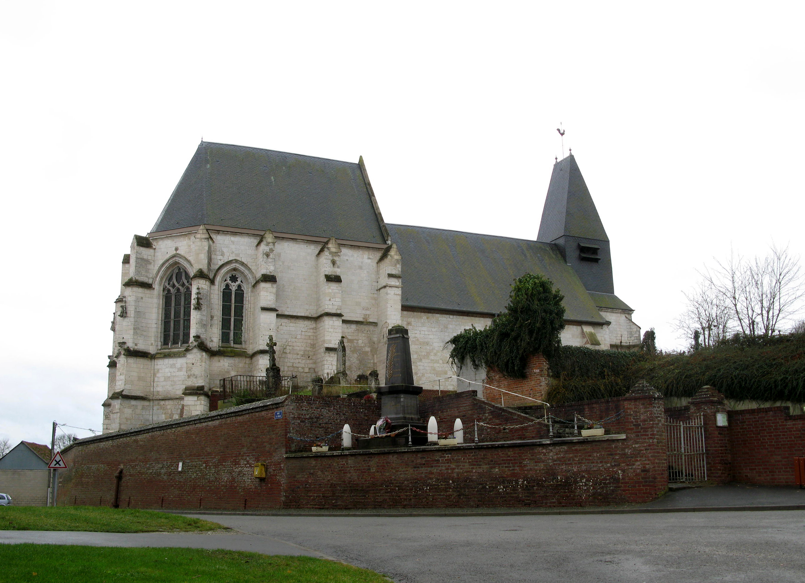 Riencourt (Somme, France) - L'église, vue alors que la petite pluie d'automne semble juste s'arrêter. On remarque, en léger contrebas mais surplombant la rue, le monument-aux-morts entouré de 4 obus.